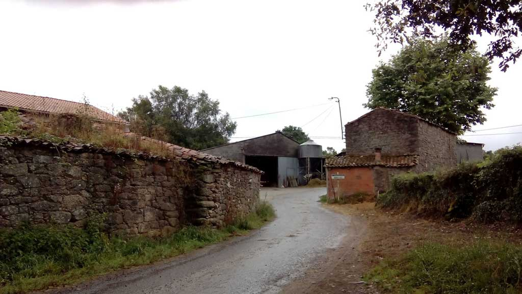 Vista de Maques de Abaixo, Curtis.